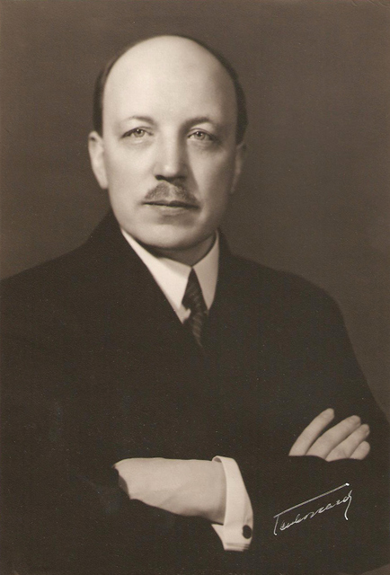 Президент Финляндии Ристо Рюти